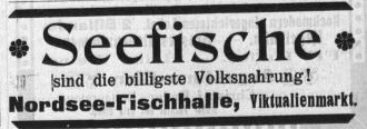 Reklame der Nordsee-Halle am Münchener Viktualienmarkt in der Münchener Ratsch-Kathl Nr. 94.